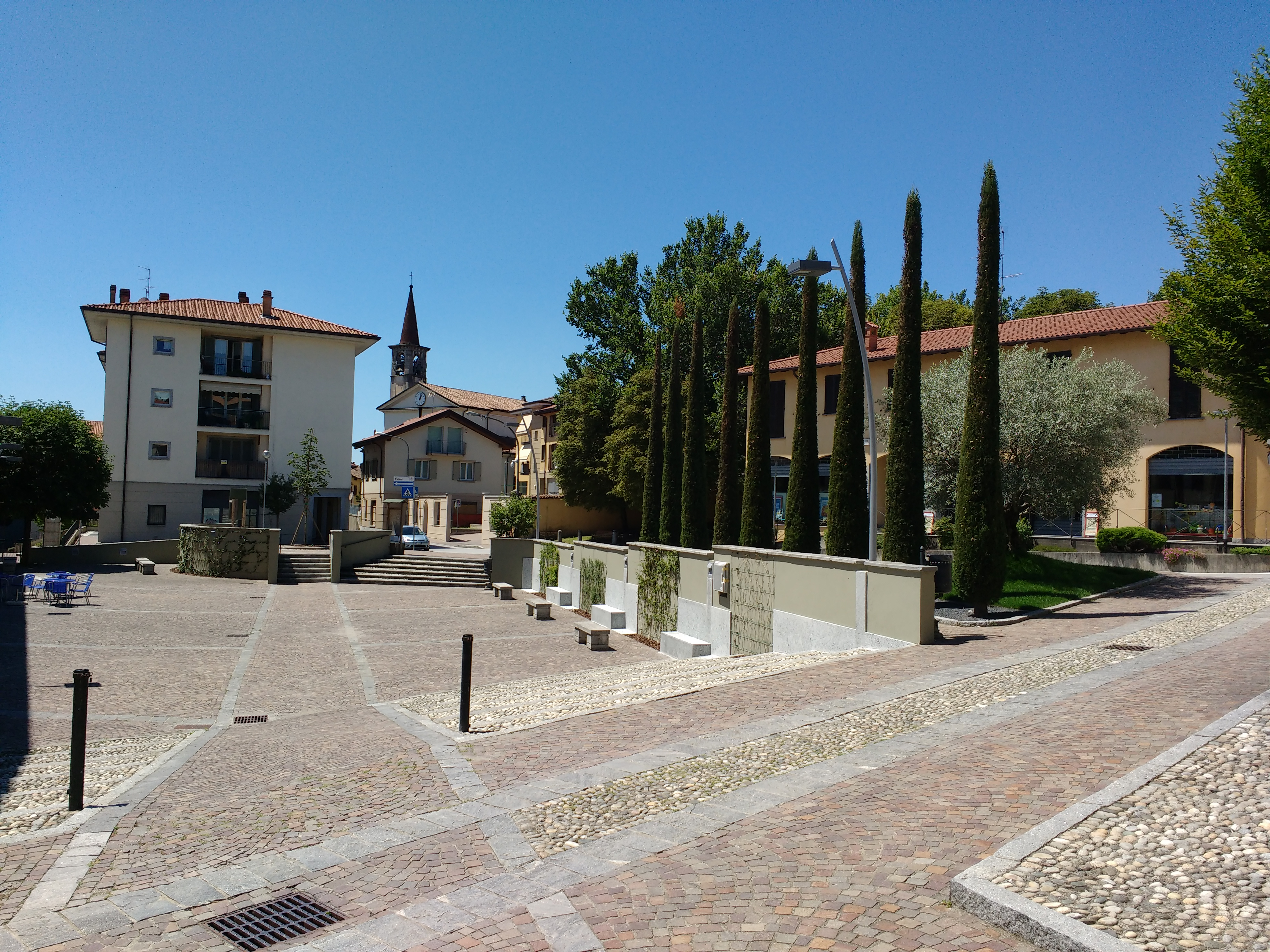 la piazza centrale di Bulciago appena ristrutturata